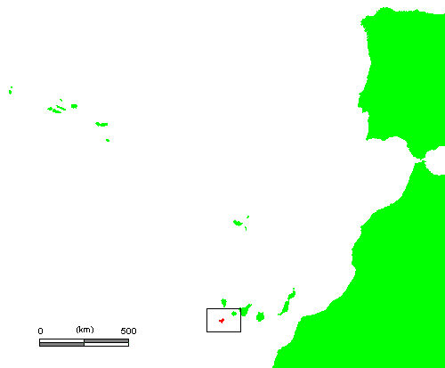 ES El Hierro.PNG